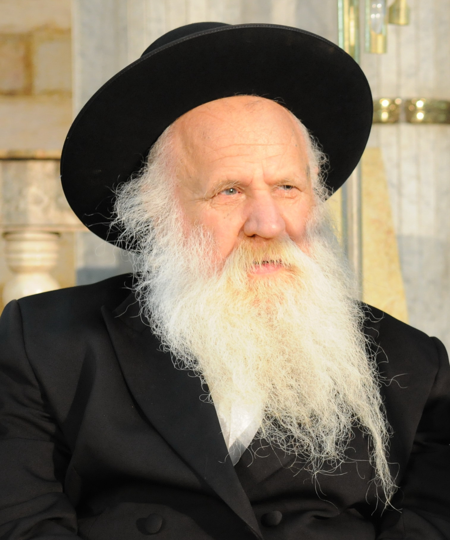 הרב מרדכי שמואל אשכנזי